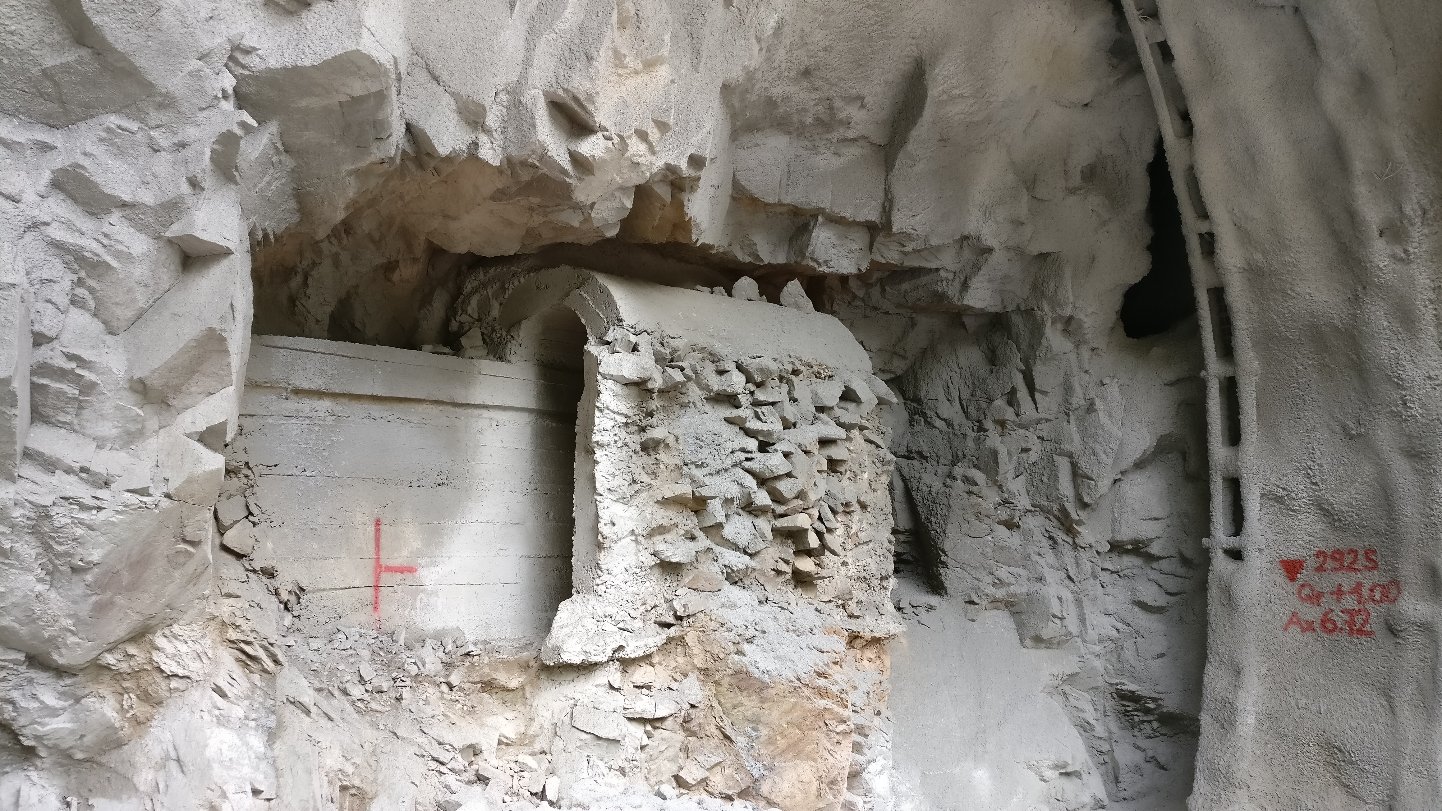 Una parte dell'ingresso dell'opera è venuto alla luce con i lavori di realizzione della nuova galleria stradale.